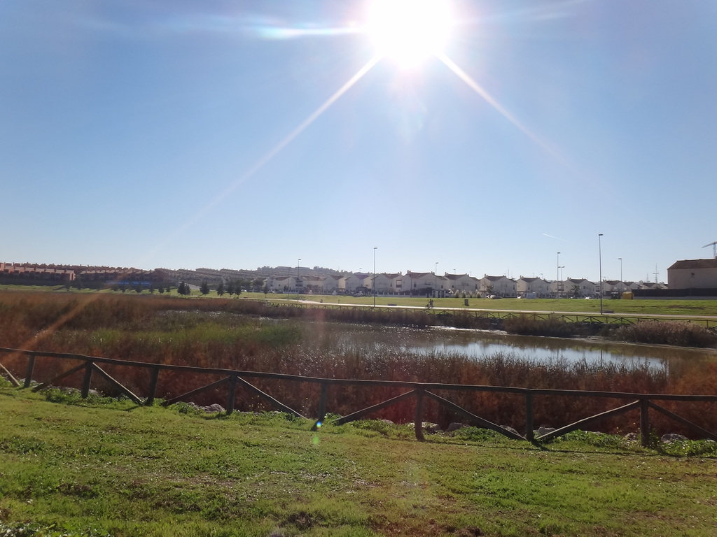 Laguna de Torrox. Jerez de la Frontera (Andalucía, España). Vista hacia loma de unifamiliares